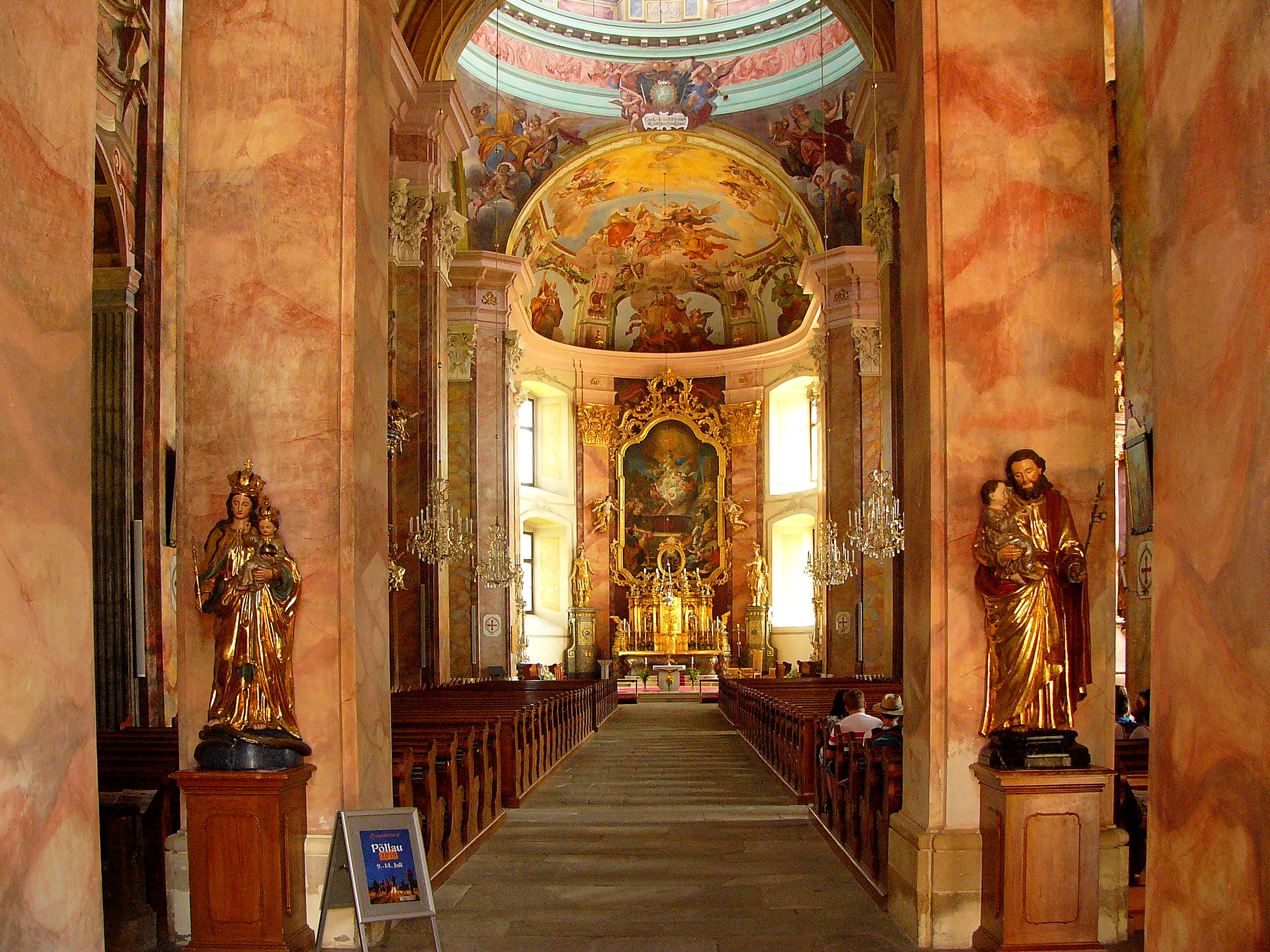 St. Veit innen.